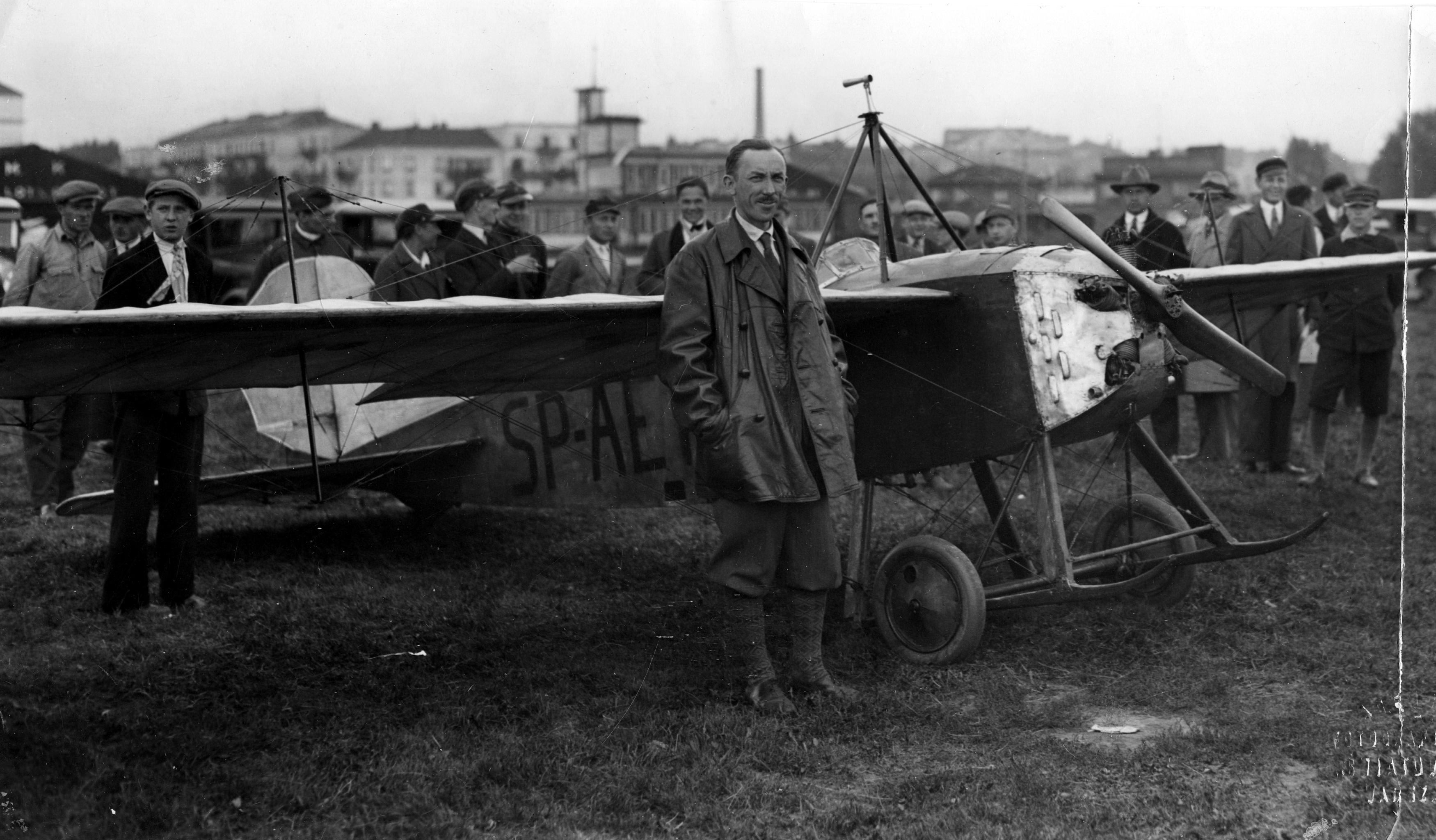 Awionetka WZ-XI "Kogutek" konstrukcji Władysława Zalewskiego (na pierwszym planie). Zarejestrowana pod oznaczeniem SP-AEF.